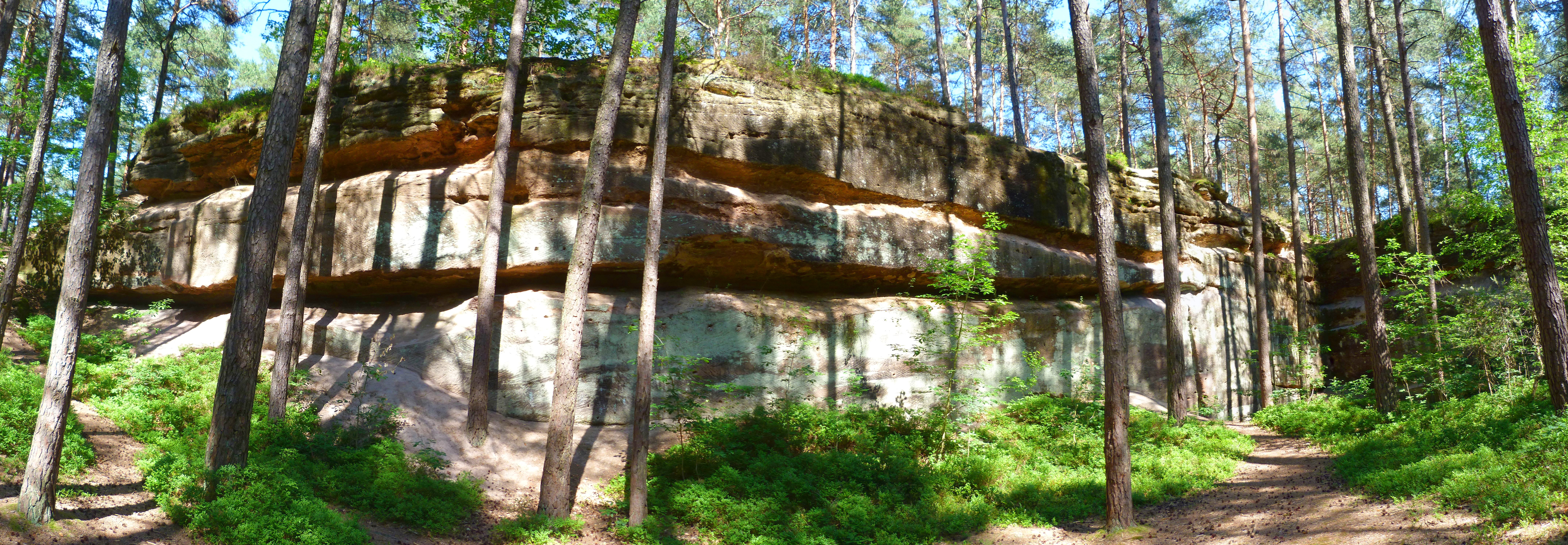 alter Sandsteinbruch im Heidenberg bei Kühedorf